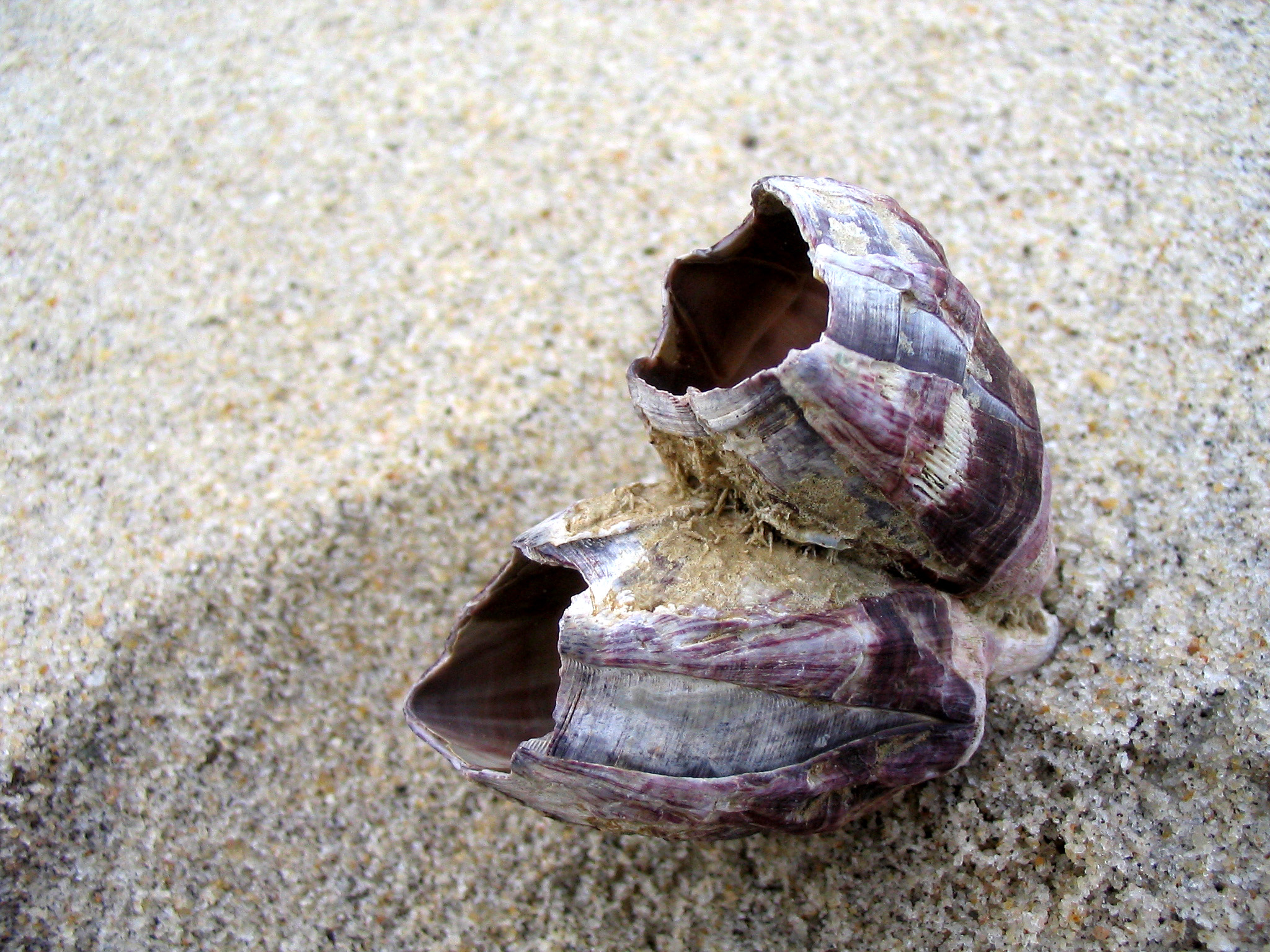 Megabalanus tintinnabulum, Mangalore, Karnataka, India